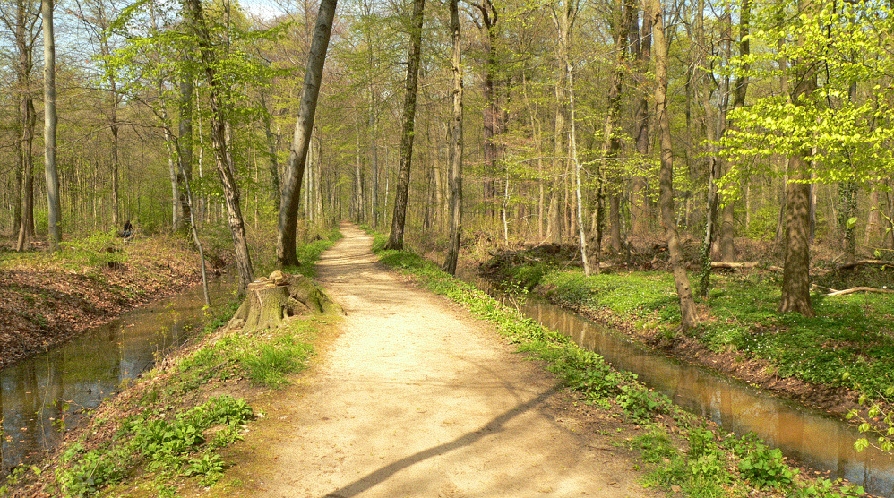 Wall- und Grabenrest der mittelalterliche Landwehr in der Eilenriede am Inselgraben hinter dem Zoo.